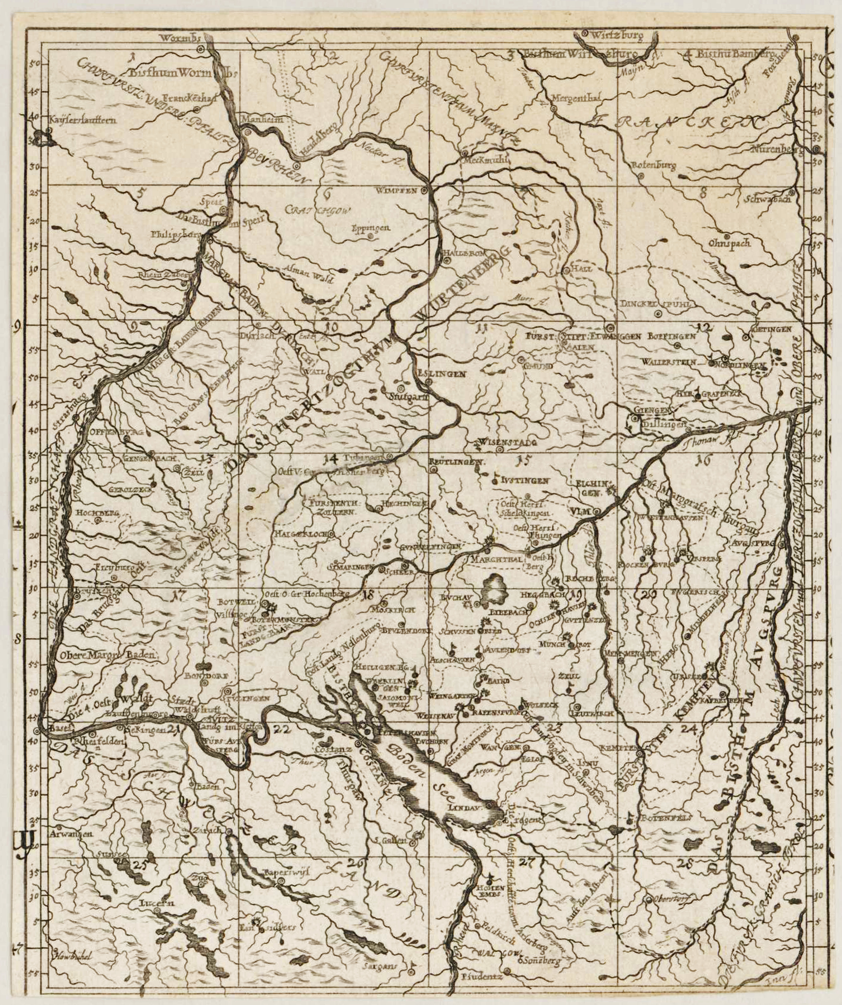 „Schwaben : in XXVIII übereintreffenden Tabellen vorgestellet ; Mit Römisch Kay. May. Allergnädigster Freyheit = Geographica Provinciarum Sveviae Descriptio“. 1679 veröffentlicht in Augsburg von Johann Georg Bodenehr (1631-1704)